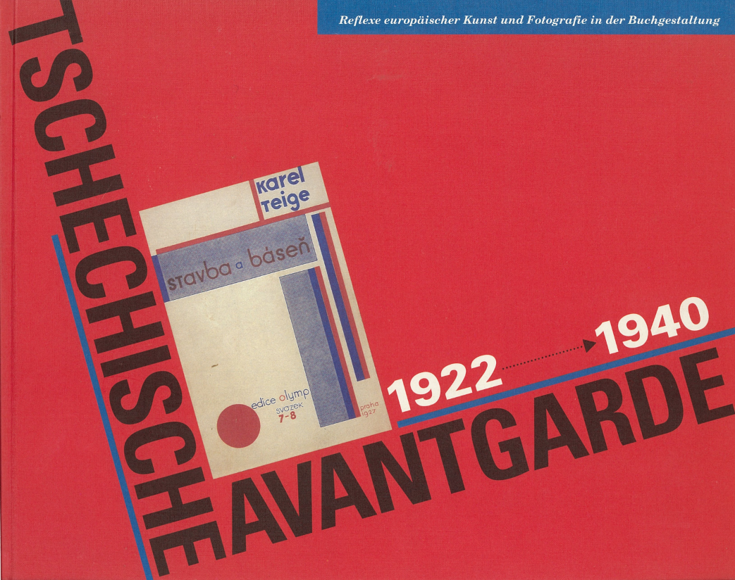 Kniha Tschechische Avantgarde 1922-40, Zdenek Primus